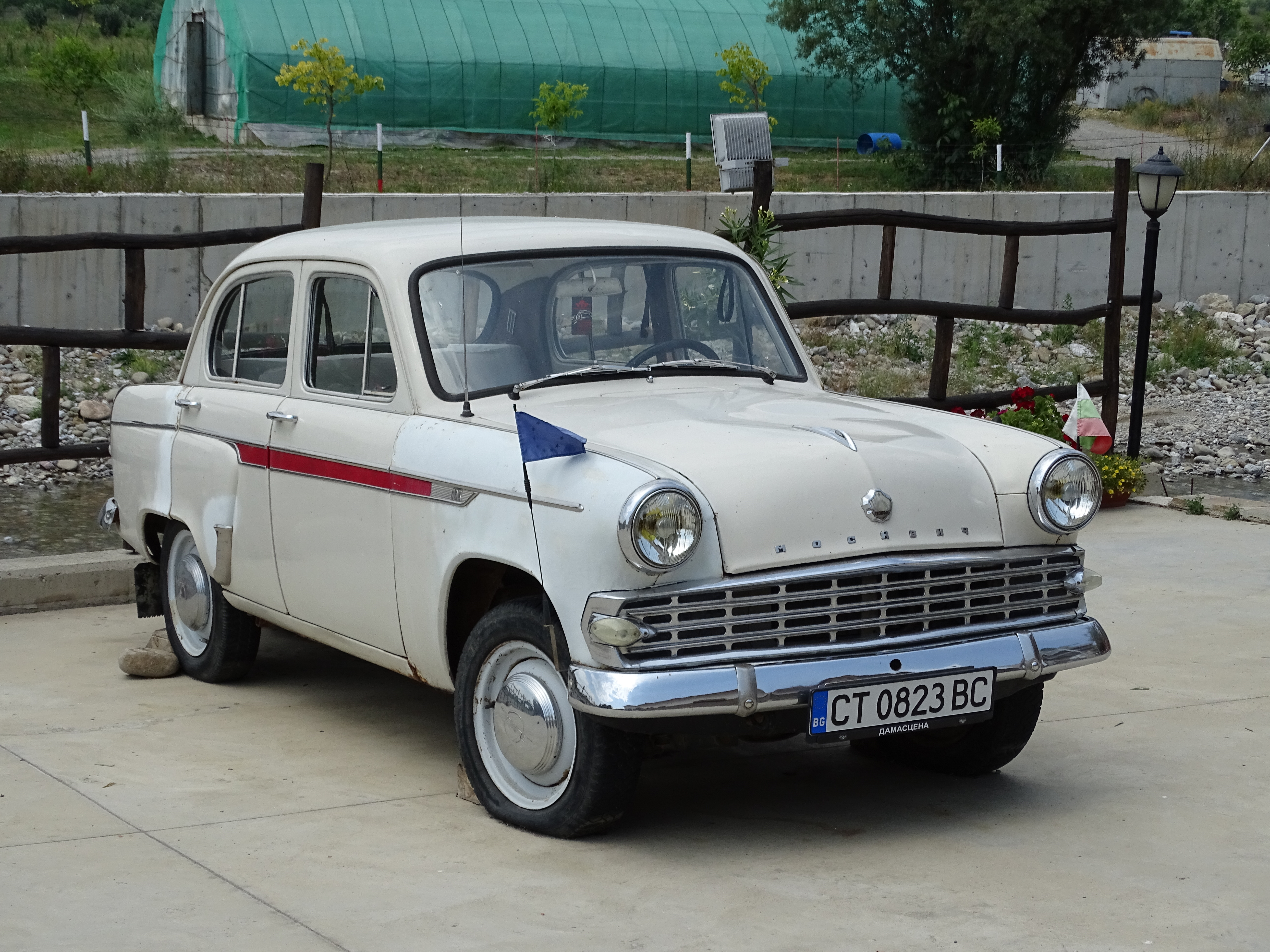 Een Moskvitch 403 op het Damascenadomein, Bulgarije.